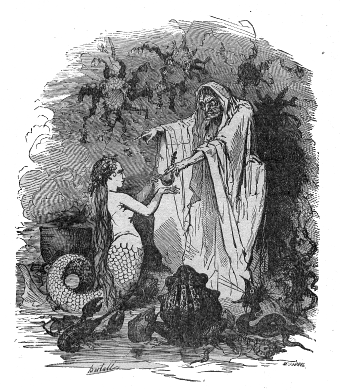 Pour la source voir : Discussion:Contes d’Andersen Vignette de La petite Sirène par Bertall représentant la petite sirène et la sorcière.